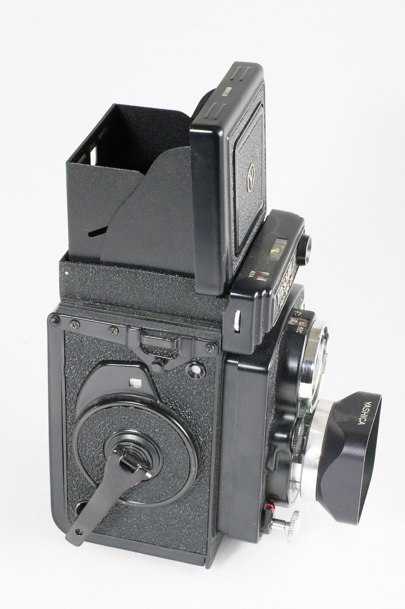 Yashica Mat 124 G mit geoeffnetem Faltlichtschachtsucher